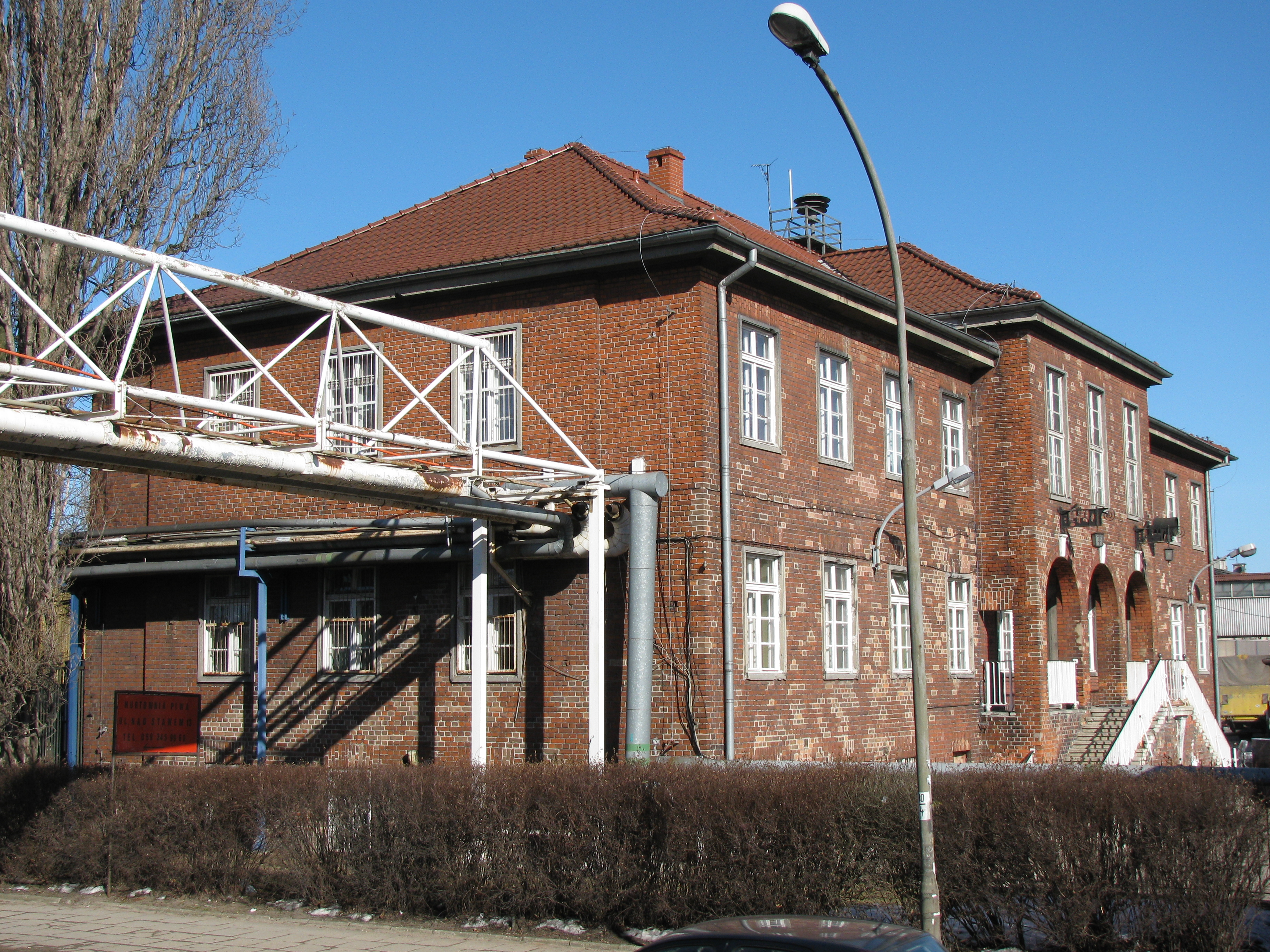 Browar we Wrzeszczu - zabytkowy budynek dyrekcyjny z 1937 r.